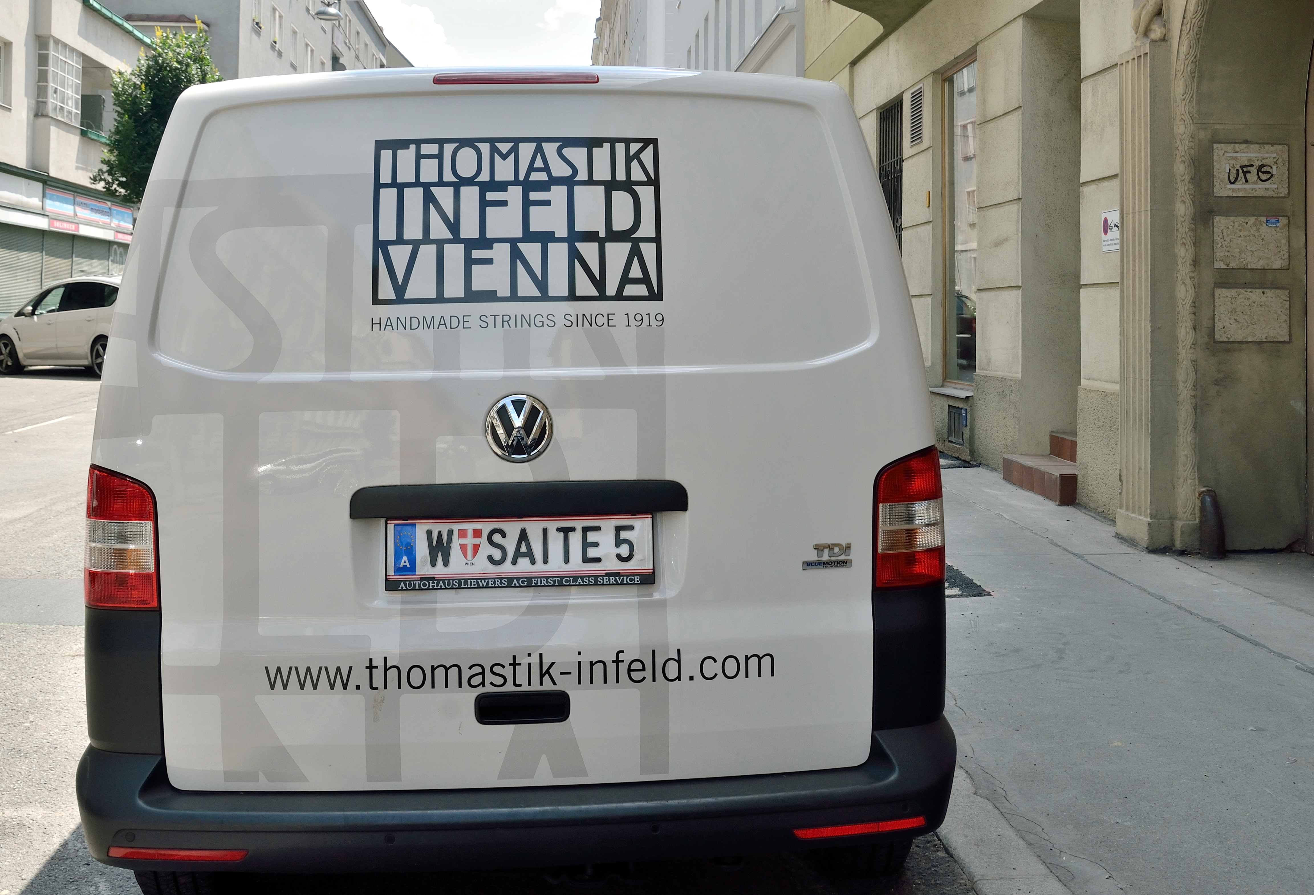 Firmenwagen der Thomastik-Infeld GmbH, vor dem Hauptsitz der Firma in der Diehlgasse in Wien-Margareten.